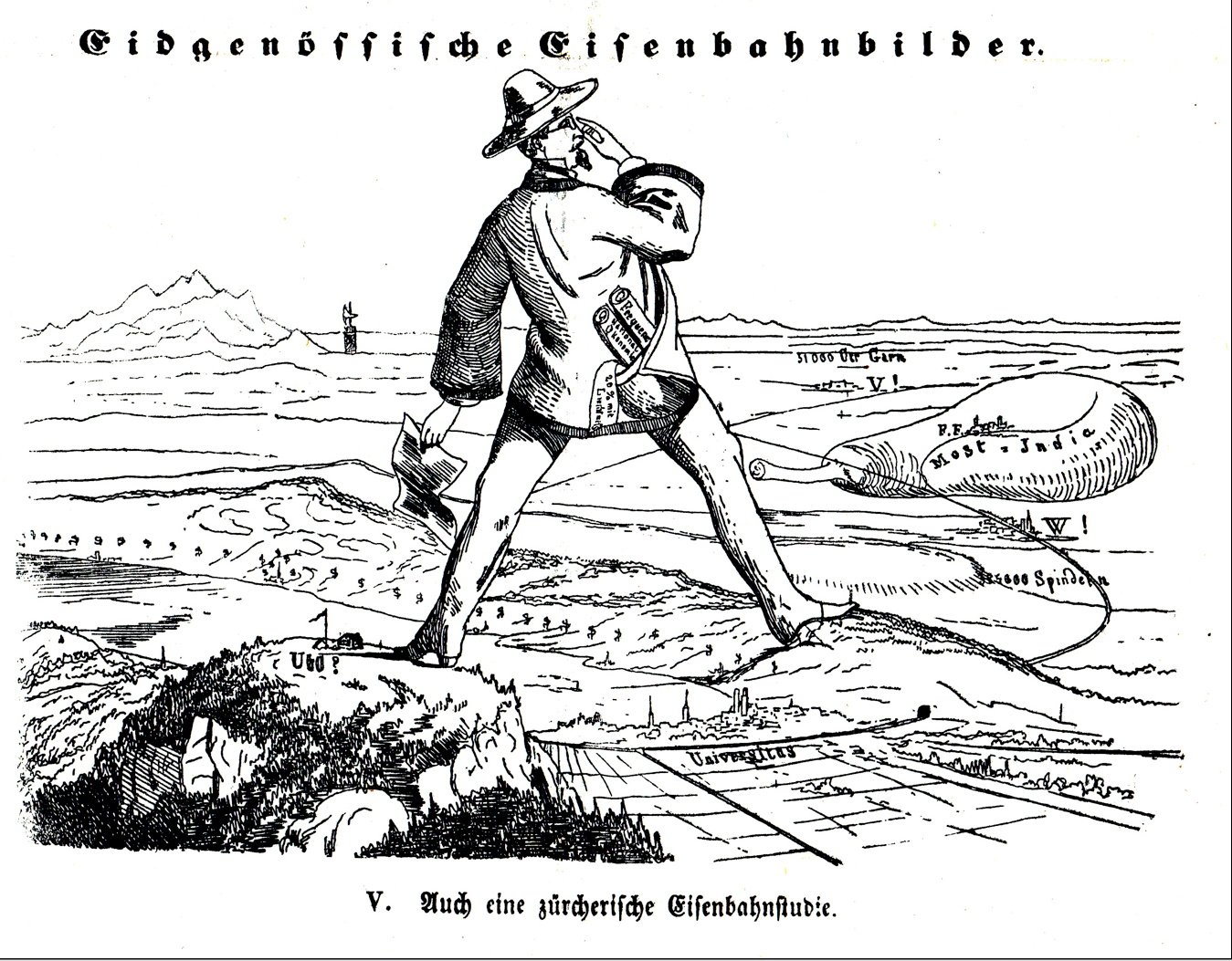 Karikatur von 1853 betreffend die Planung des schweizerischen (bzw. zürcherischen) Eisenbahnnetzes.